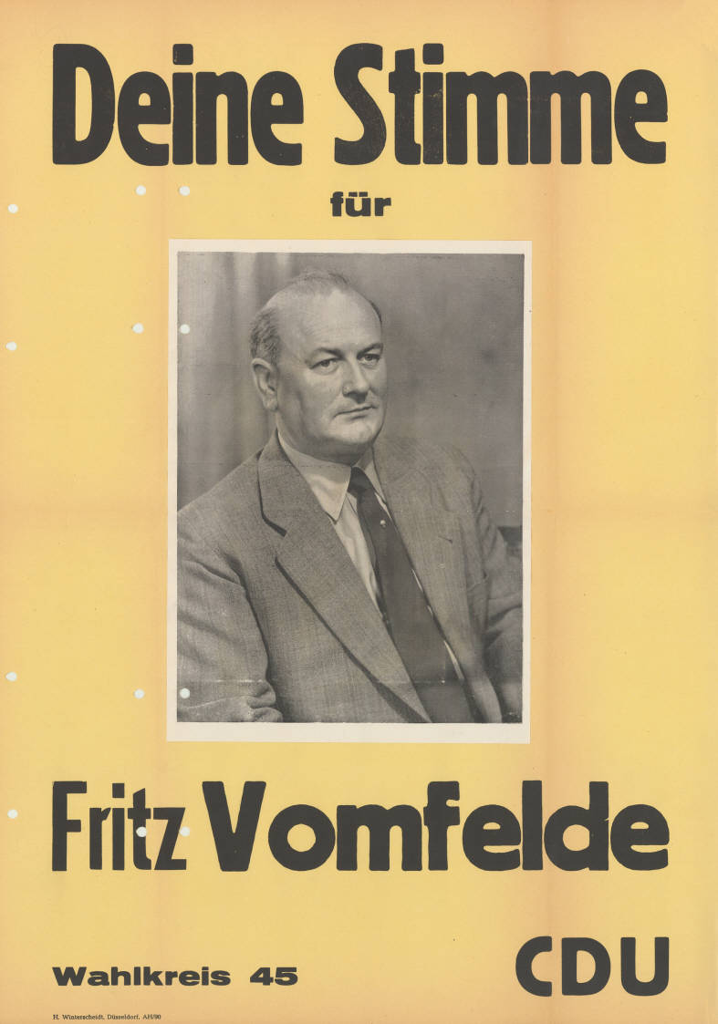 Deine Stimme für Fritz Vomfelde Wahlkreis 45 CDU Abbildung: Porträtfoto Kommentar: Das Foto ist aufgeklebt. Plakatart: Kandidaten-/Personenplakat mit Porträt Drucker_Druckart_Druckort: H. Winterscheidt, Düsseldorf, AH/90 Objekt-Signatur: 10-009 : 249.6 Bestand: Landtagswahlplakate Nordrhein-Westfalen (10-009) GliederungBestand10-18: Landtagswahlplakate Nordrhein-Westfalen (10-009) » Landtagswahl am 18.6.1950 » CDU » mit Porträtfoto Lizenz: KAS/ACDP 10-009 : 249.6 CC-BY-SA 3.0 DE